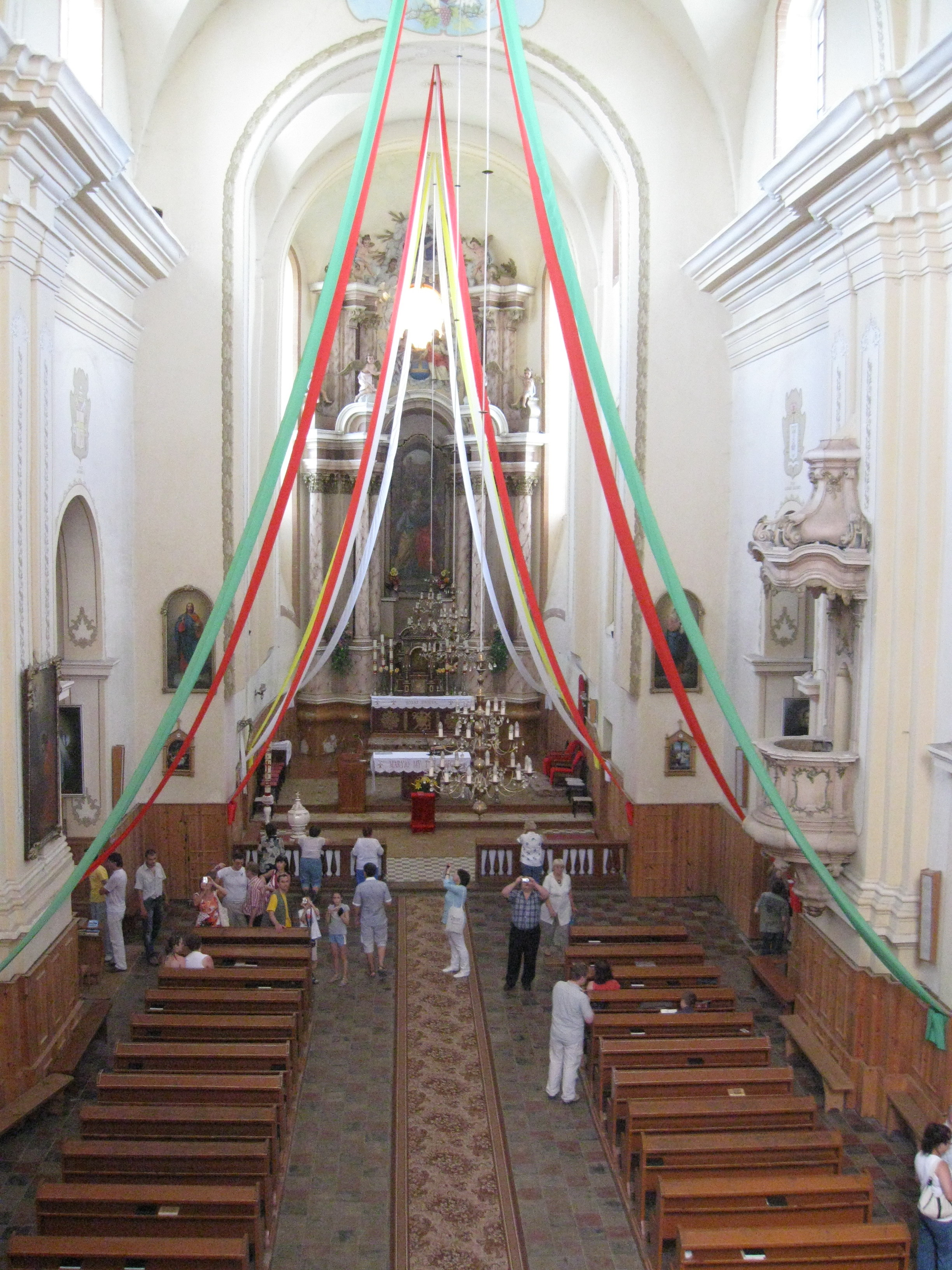 Беларуская (тарашкевіца): Ансамбль былога манастыра базылян: Петрапаўлаўская царква са званіцай, агароджай і брамамі дэкаратыўнае аздабленьне інтэр’ера царквы: тры алтары, амбон жылы корпус капліца. в. Баруны This is a photo of Belarusian heritage monument. Reference number: 412Г000062 ( WLM)